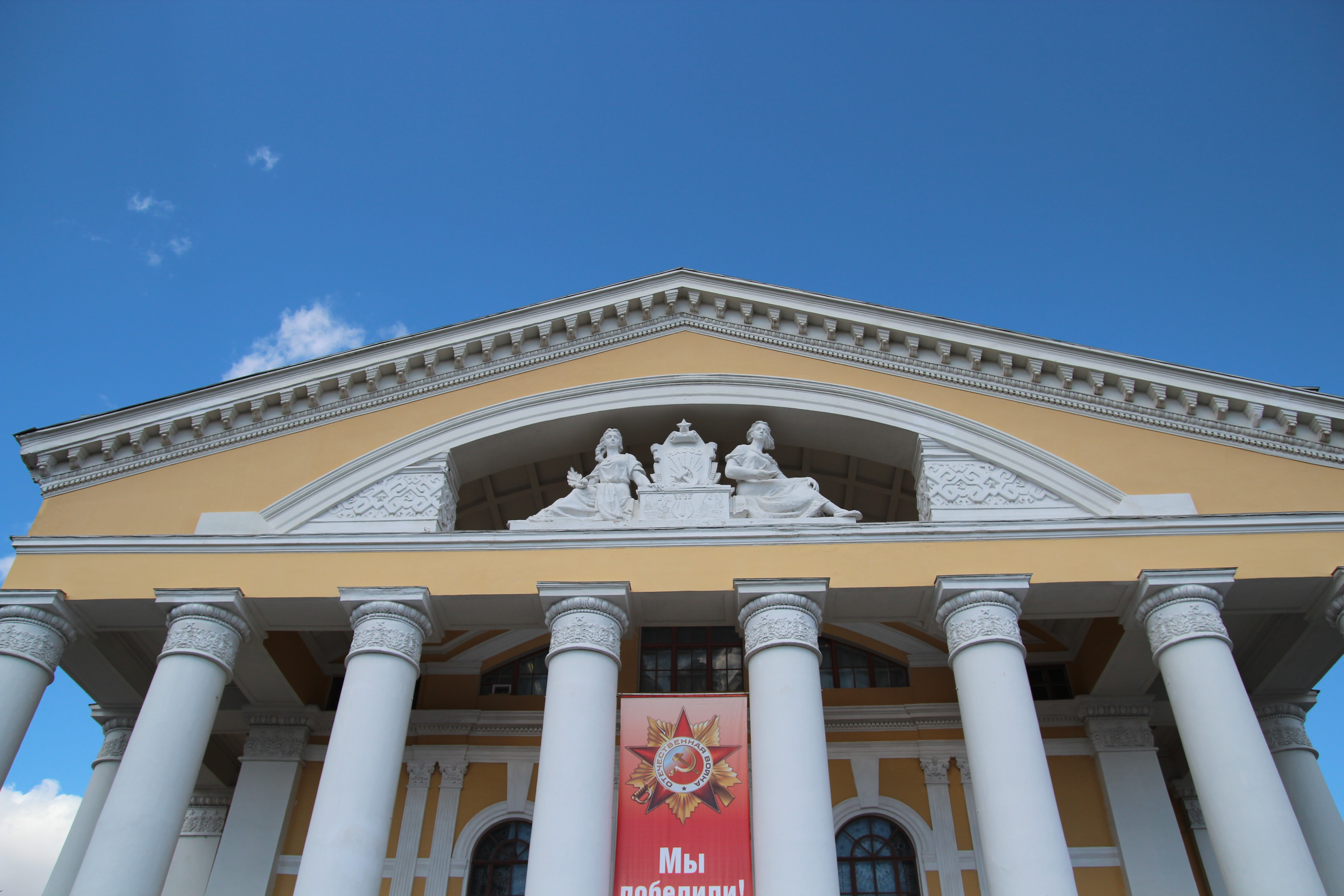 Театр марийский драматический: площадь Ленина, 2, Йошкар-Ола, Марий Эл